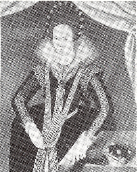 Margareta von Braunschweig-Lüneburg, Frau von Johann Casimir